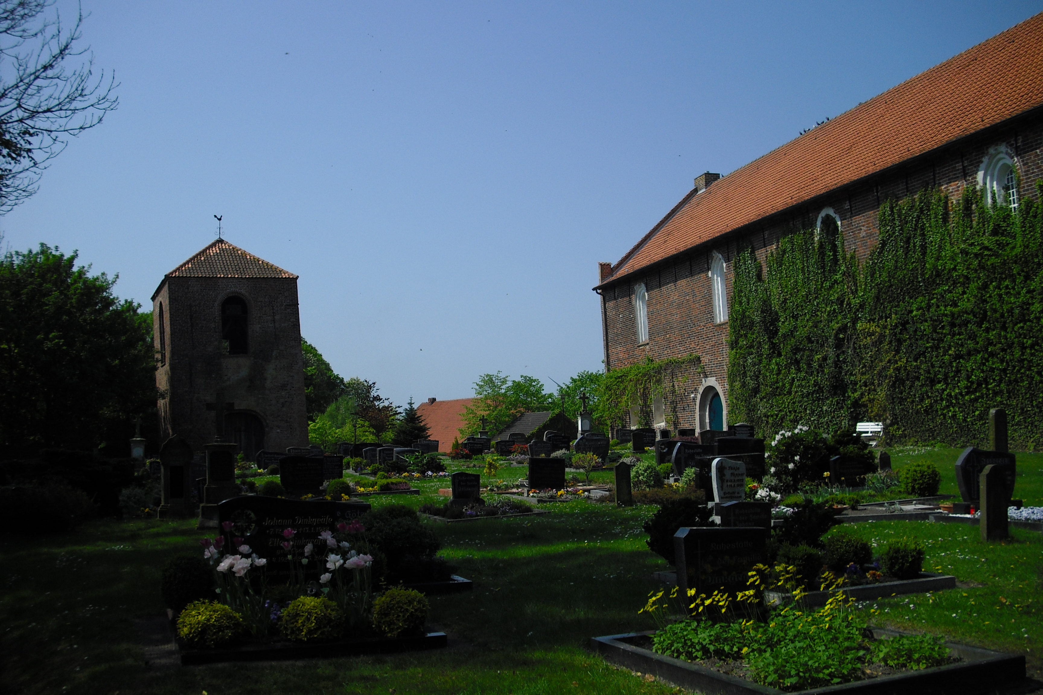 Evangelische Kirche Westochtersum mit Glockenturm